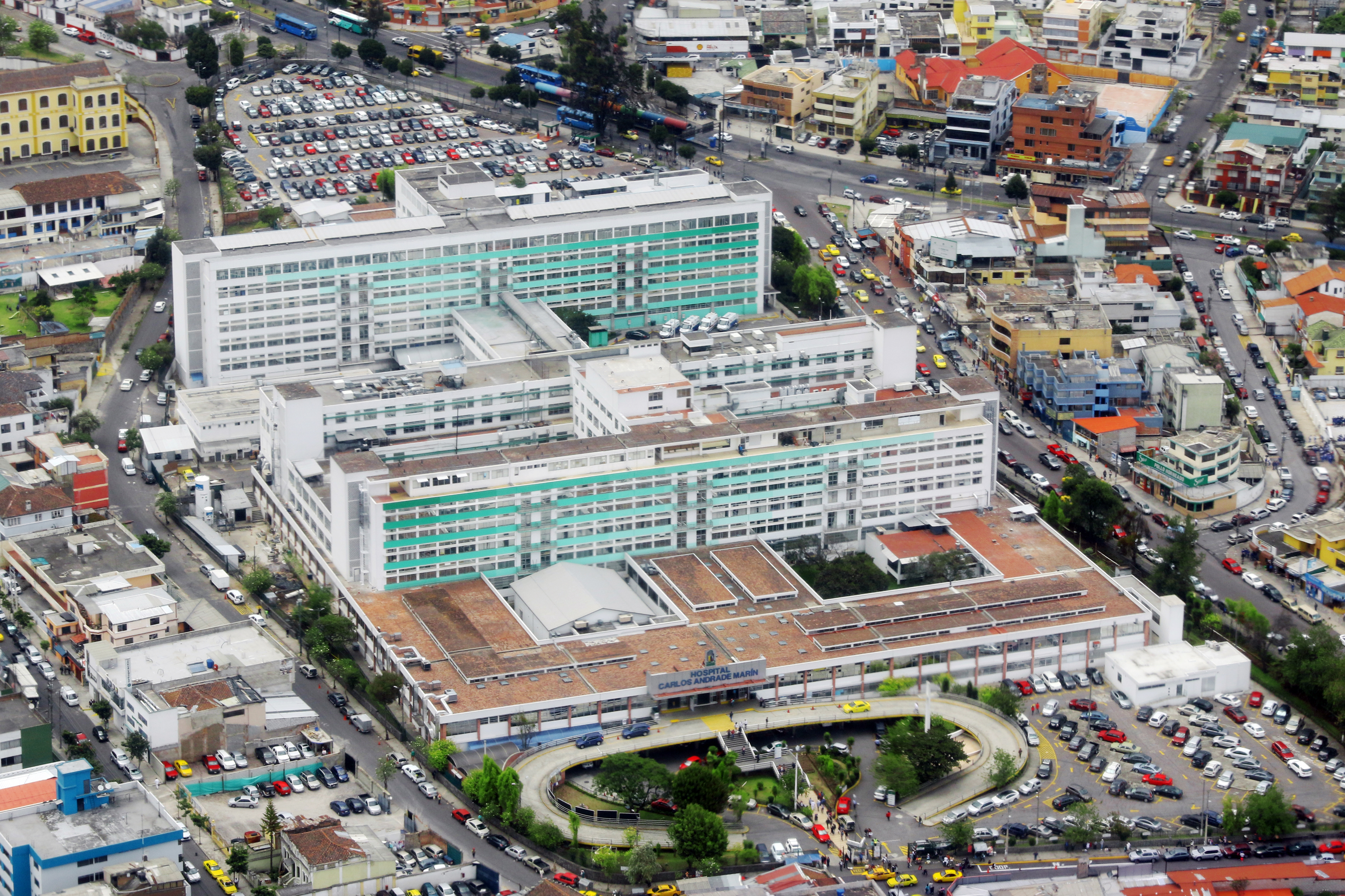 Quito, 13 de octubre de 2017 (Andes).- Conocer Quito desde las alturas es una sensación difícil de describir. Ciudad mágica, llena de contrastes nos muestra otra mirada desde su increíble cielo azul; su arquitectura; sus Plazas y Parques han convertido a la ciudad en una de las más hermosas de América Latina. ANDES/Micaela Ayala V.